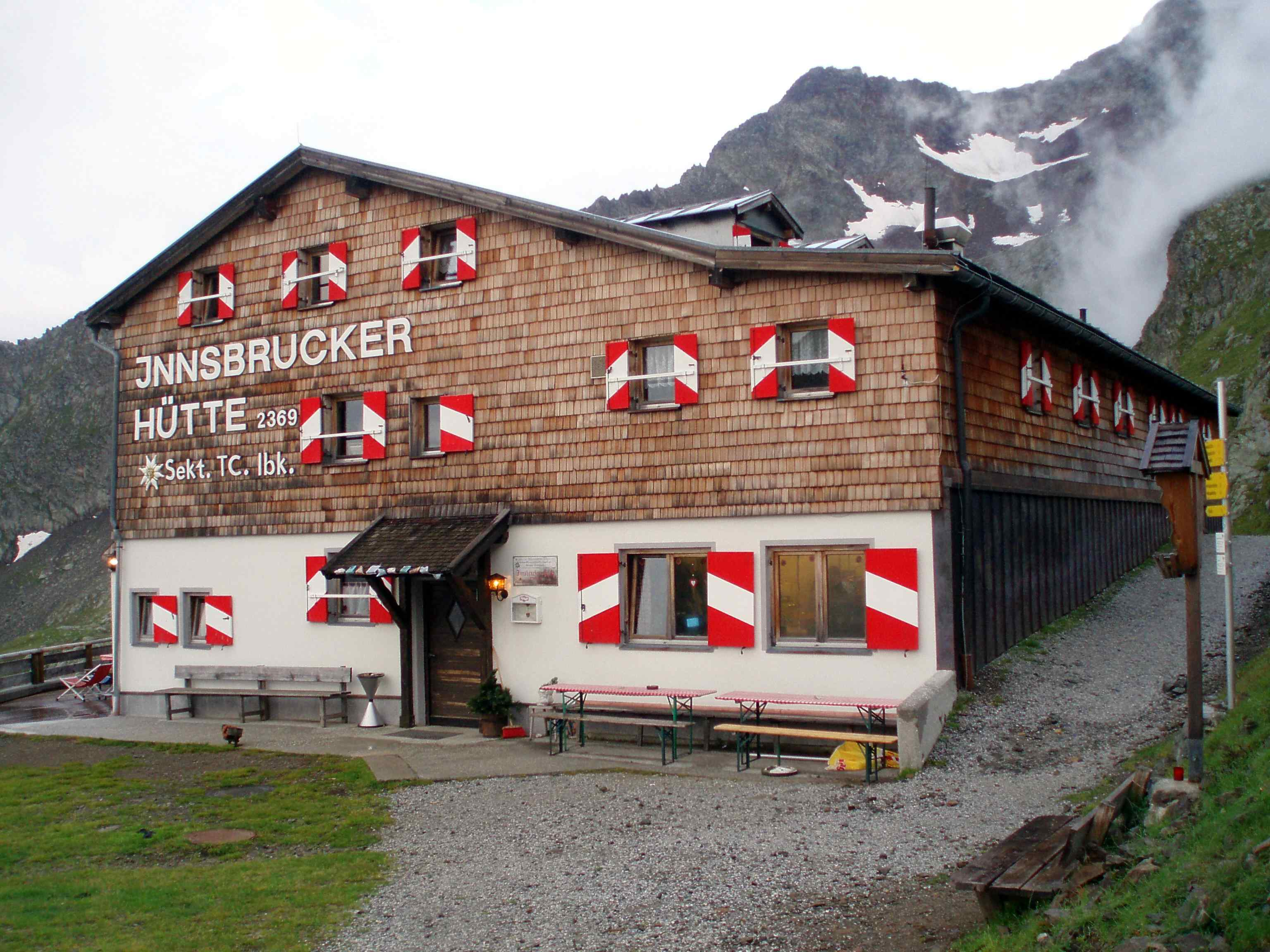 Innsbrucker Hütte